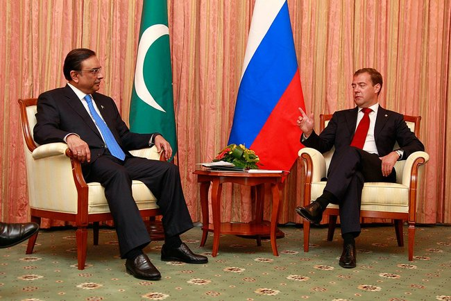 С Президентом Пакистана Асифом Али Зардари.